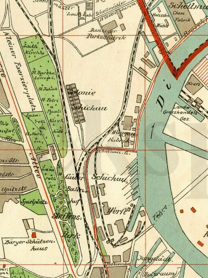 Gdańsk Aniołki (park Steffensa oraz nieistniejące cmentarze) i Gdańsk Młyniska (Stocznia Schichaua oraz Waggonfabrik) na planie z 1912 r.